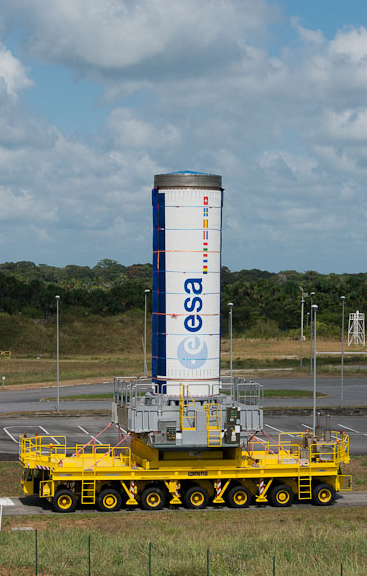 P80 durante un trasferito.